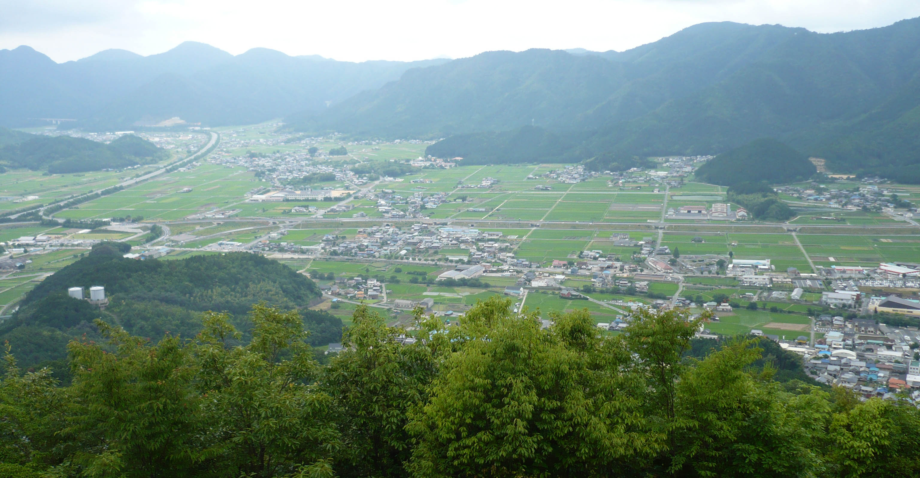 本丸からの眺望